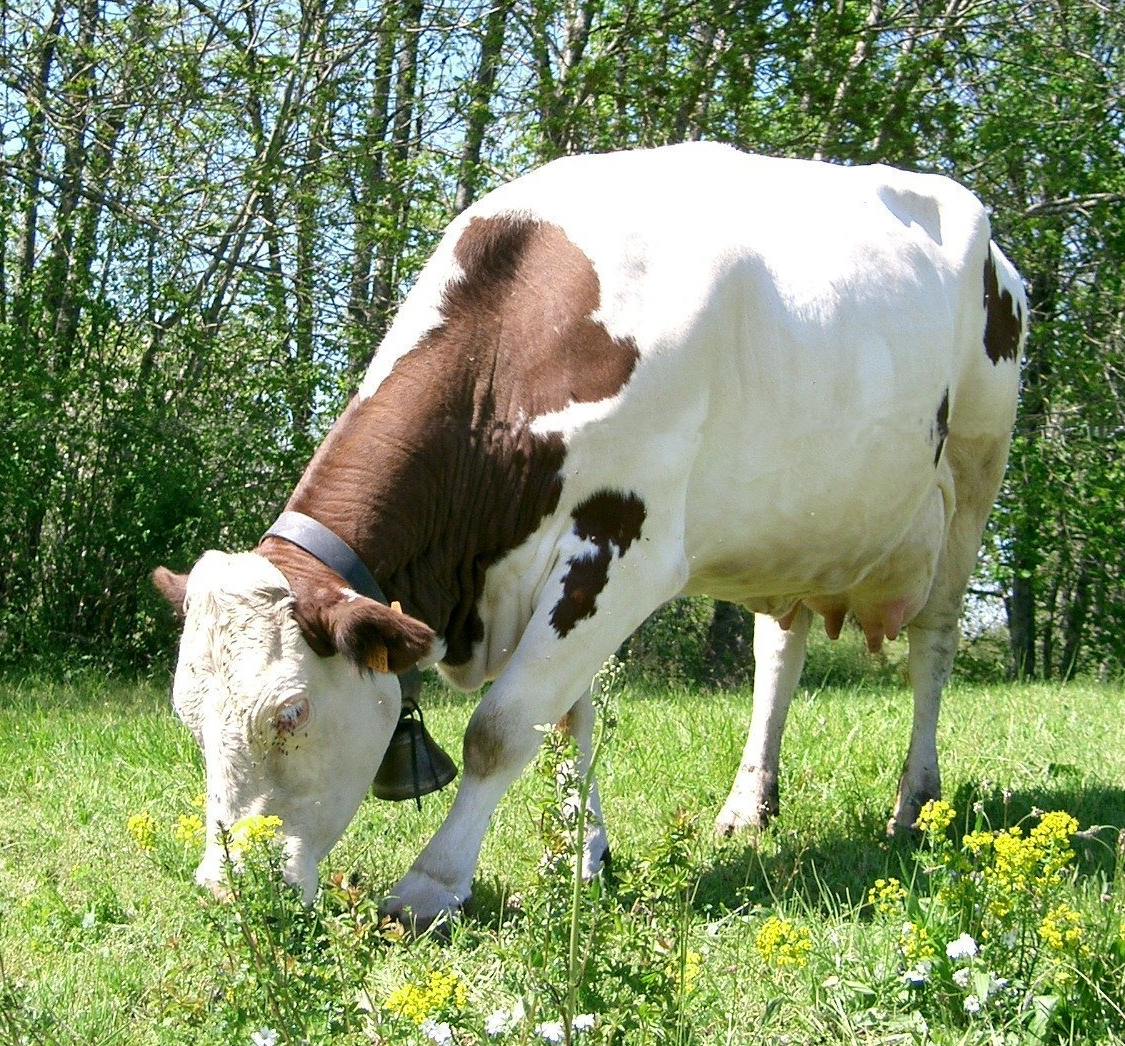 vache montbéliarde Jura photo personnelle PRA